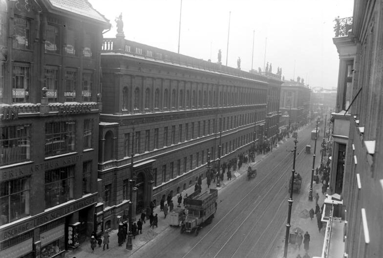 Das Ausladen der Liebesgaben auf dem Schlesischen Bahnhof in Berlin. Das Kriegsministerium als Kaufhaus; durch die Finanznot des Reiches sieht sich die Staatsregierung gezwungen, das Kriegsministerium mit Läden auszustatten, und dem Geschäftsleben dienstbar zu machen. Das Kriegsministerium in der Leipziger Strasse in Berlin.